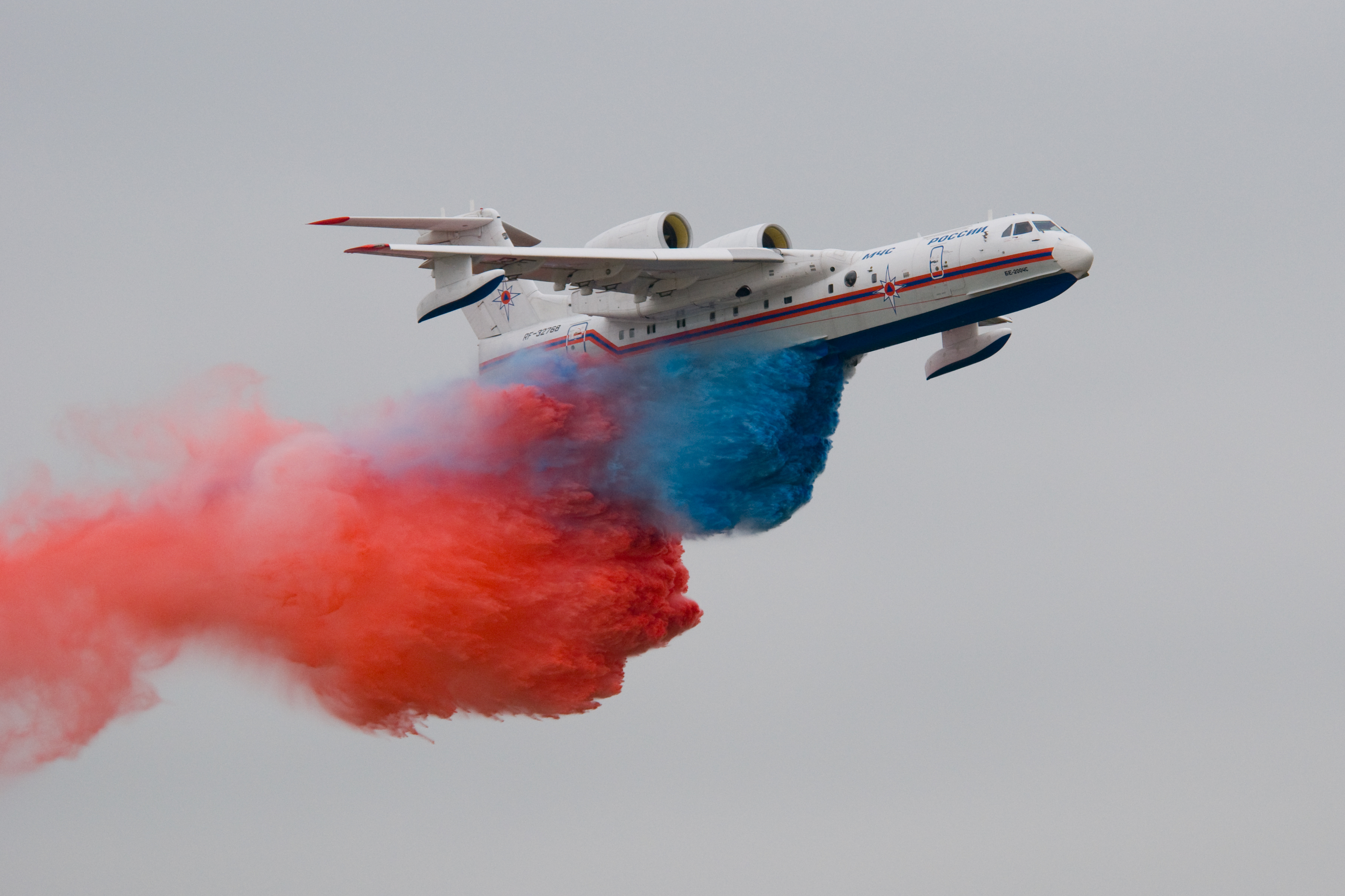 MAKS